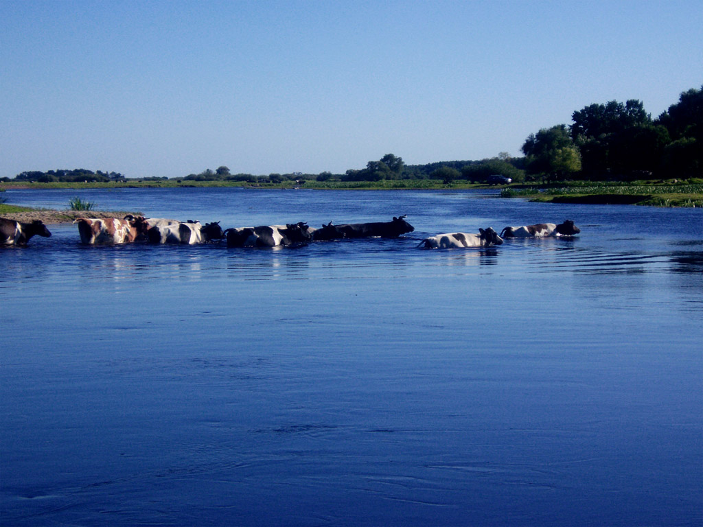 Szczęśliwe krowy z Brzostowa